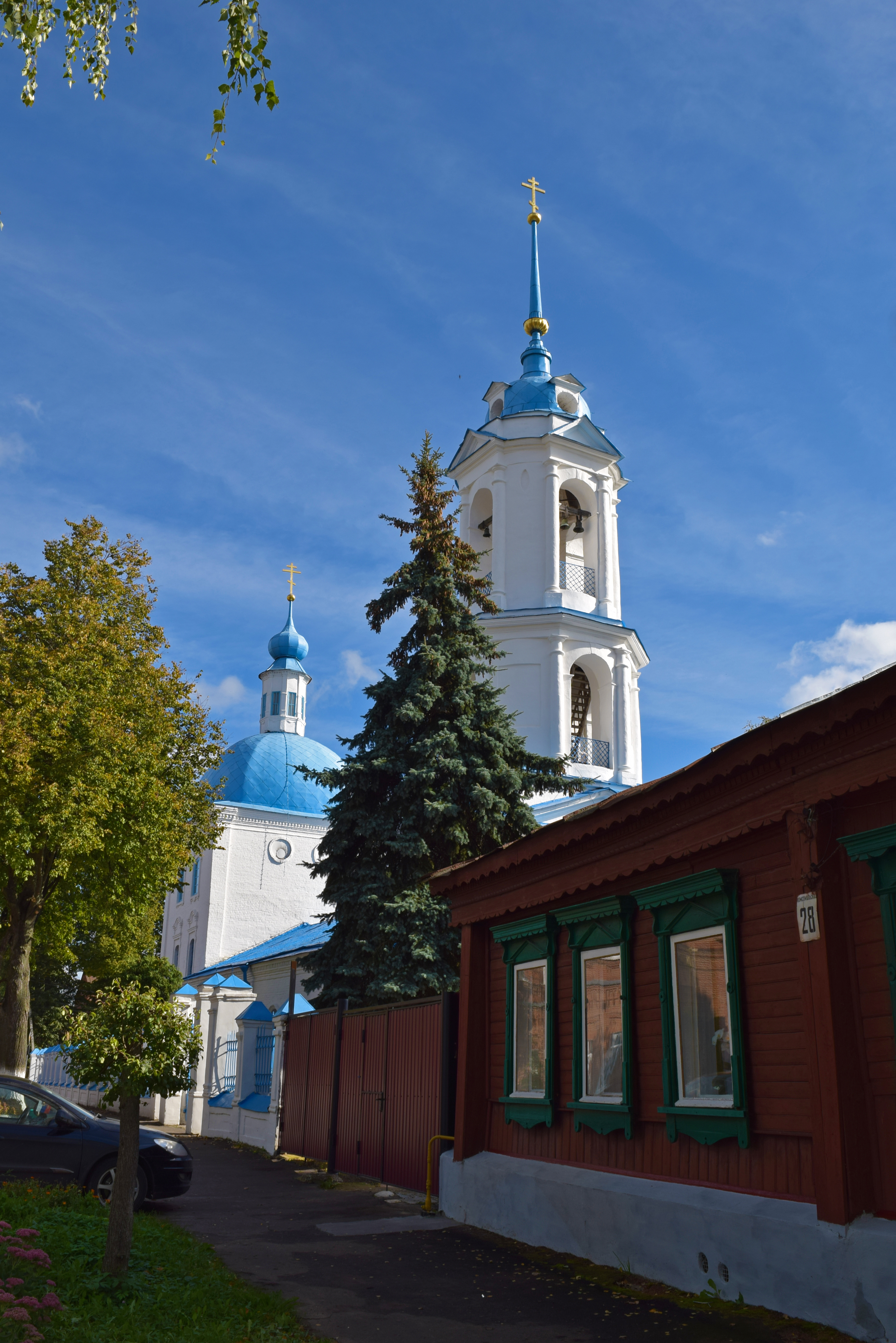 Благовещенская церковь с приделами в честь Архангела Михаила и преподобного Сергия.